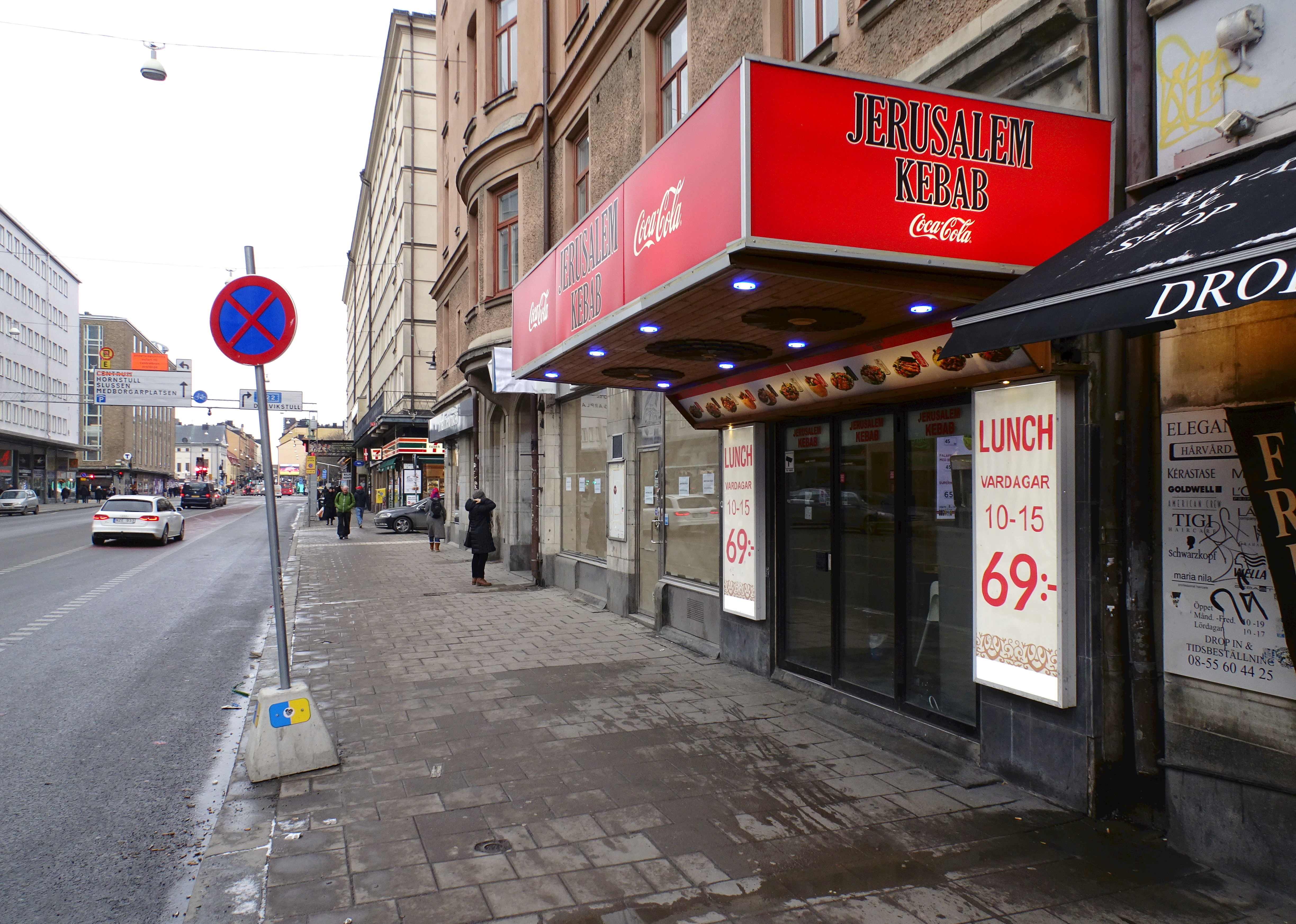 Götgatan 59 (tidigare biograf Piccadilly)